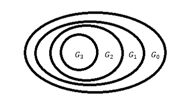 İzahı:N.Xomskiyə görə doğuran qrammatikaların həndəsi interpretasiyası